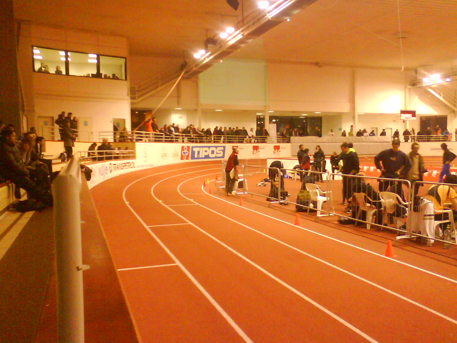 Športová hala Elán počas Mítingu Elán 2011